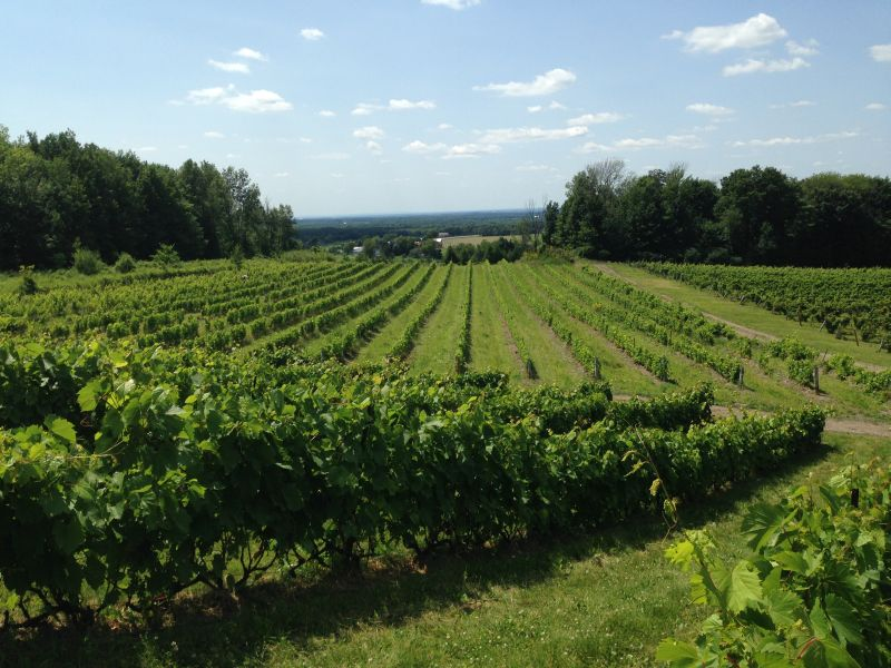 Vue du Vignoble Domaine Côte d'Ardoise sur La Route des vins de Brome-Missisquoi.